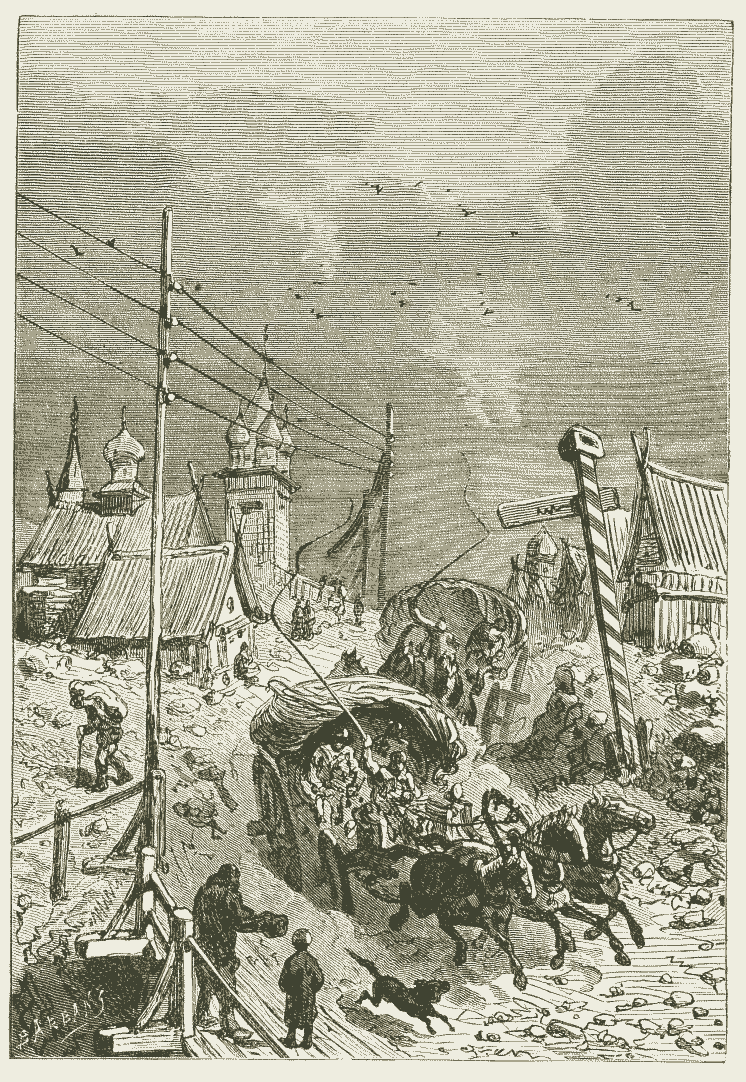 Jules Verne, gravure uit boek "Michael Strogoff", boek is van 1918 of iets ouder. Deze afdruk is uit de Nederlandse vertaling, de zogenaamde "oude blauwe bandjes". Het is uit 1918 of ouder, en kostte 1,50 gulden. Uitgevers-maatschappij "Elsevier", Amsterdam. Stoomdrukkerij P.J. Out Zaandijk.